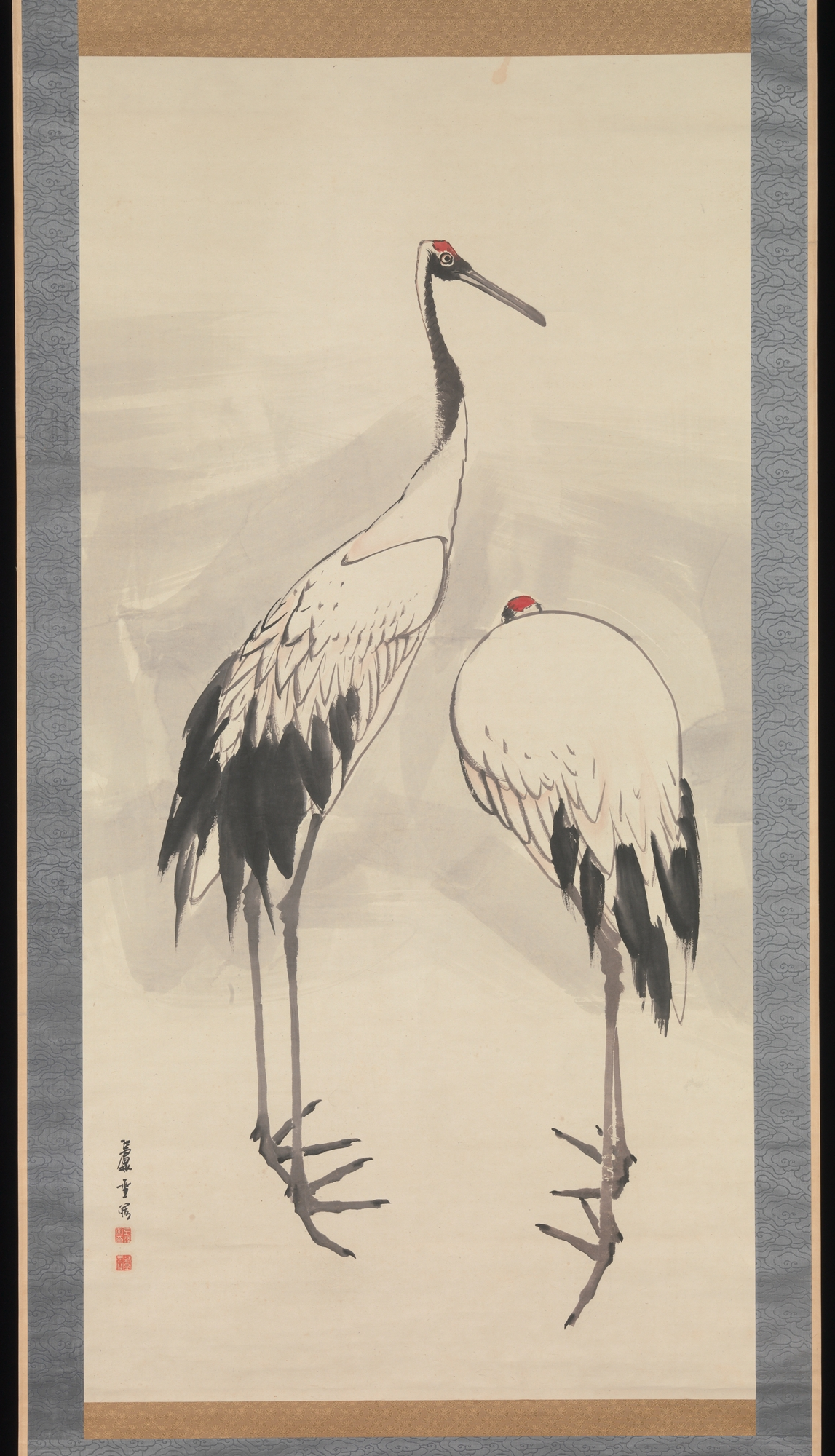 Japan; Hanging scrolls; Paintings